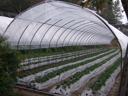 烏來生態農場溫室草莓.